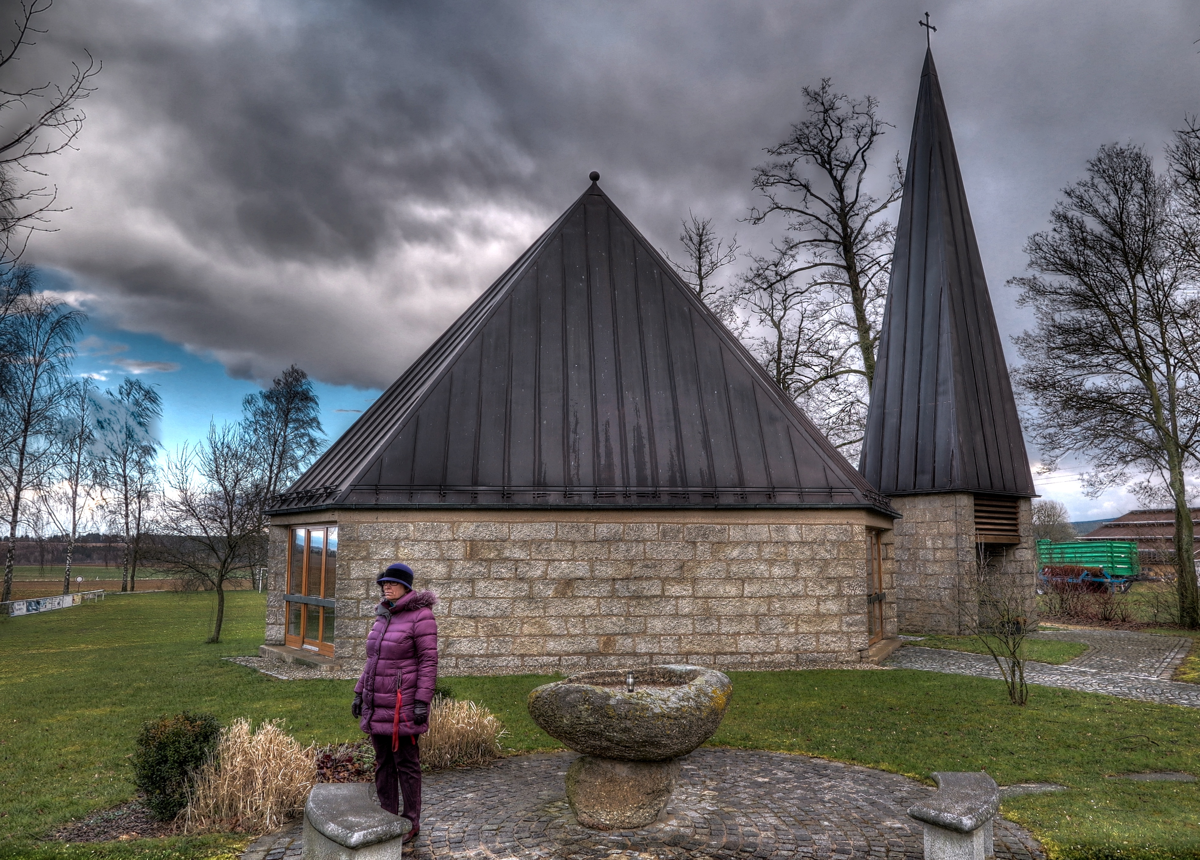 Deutschland, Bayern, Oberpfalz, Waldsassen, Ortsteil Hatzenreuth, Bruder Klaus Kapelle